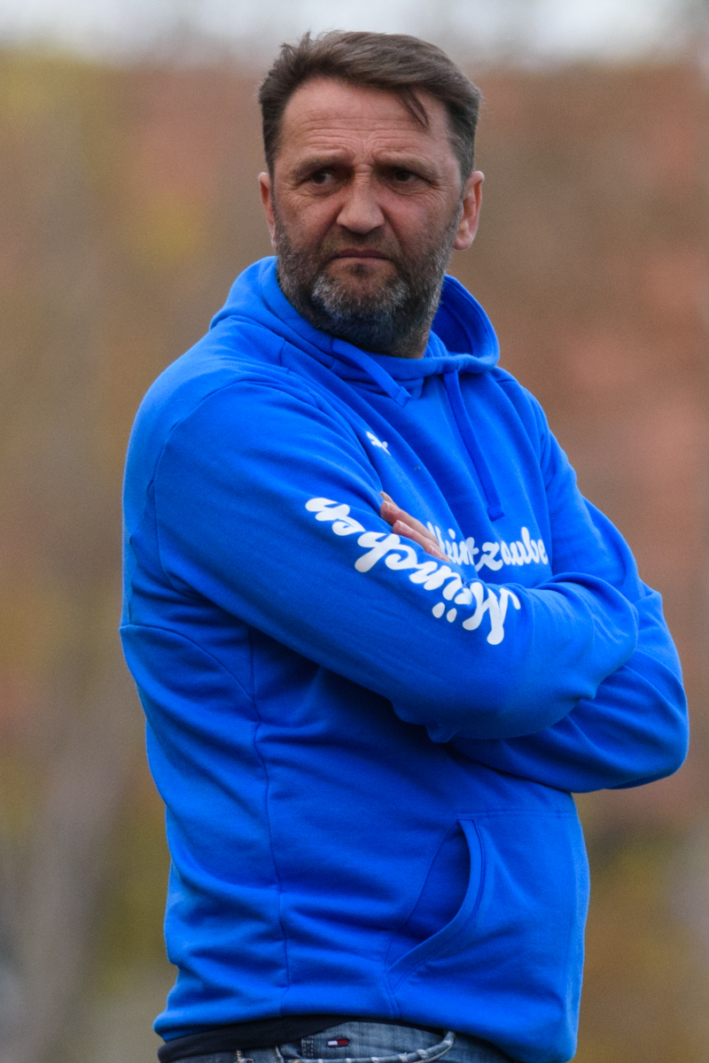 Dragan Terzić als Trainer vom FFC Wacker München; 22. April 2019